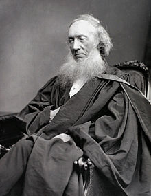 Sir Andrew Buchanan, 1st Baronet (1807-1882)